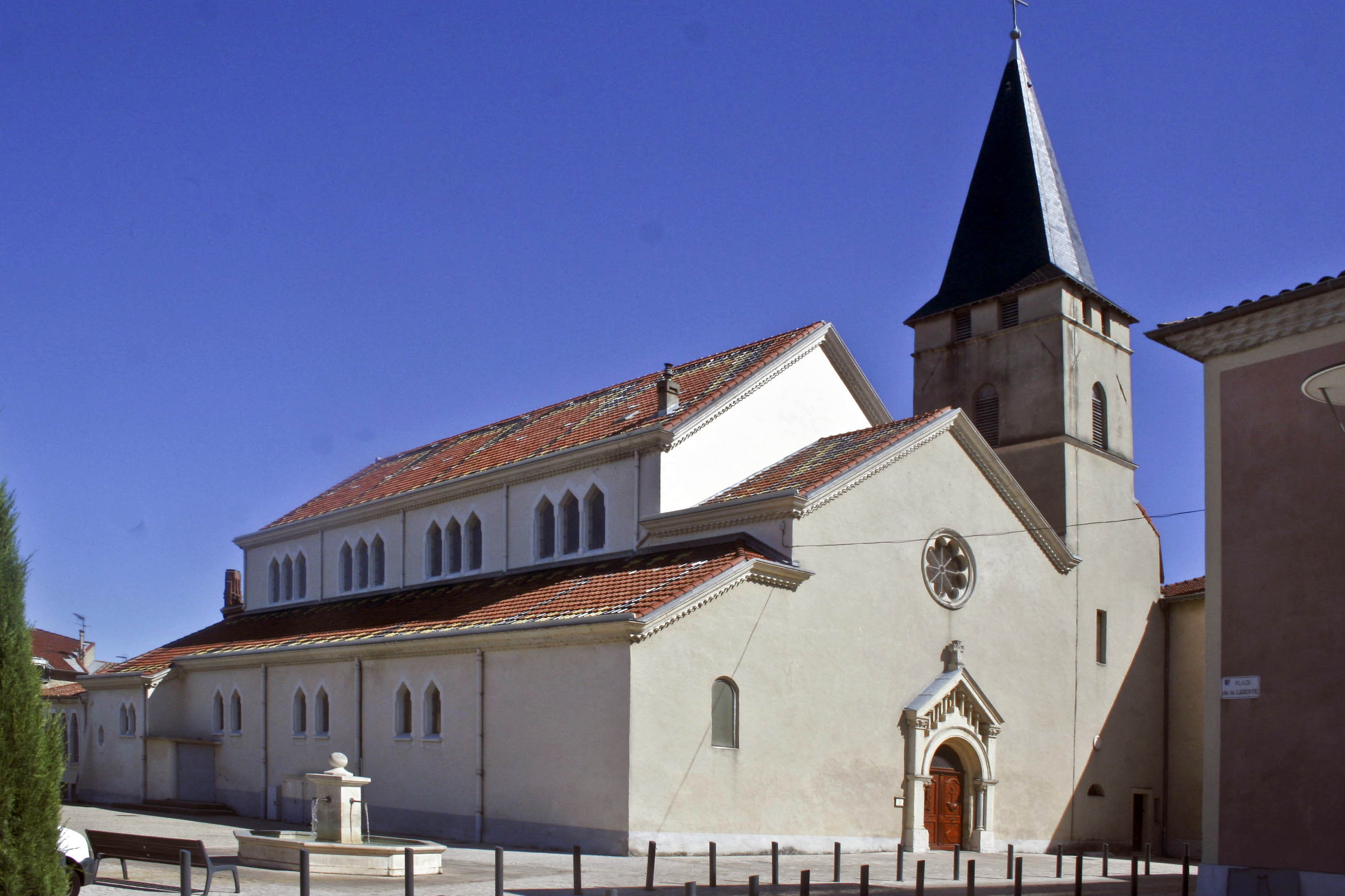 Église Saint-Pierre, Bourg-lès-Valence, Drôme, France